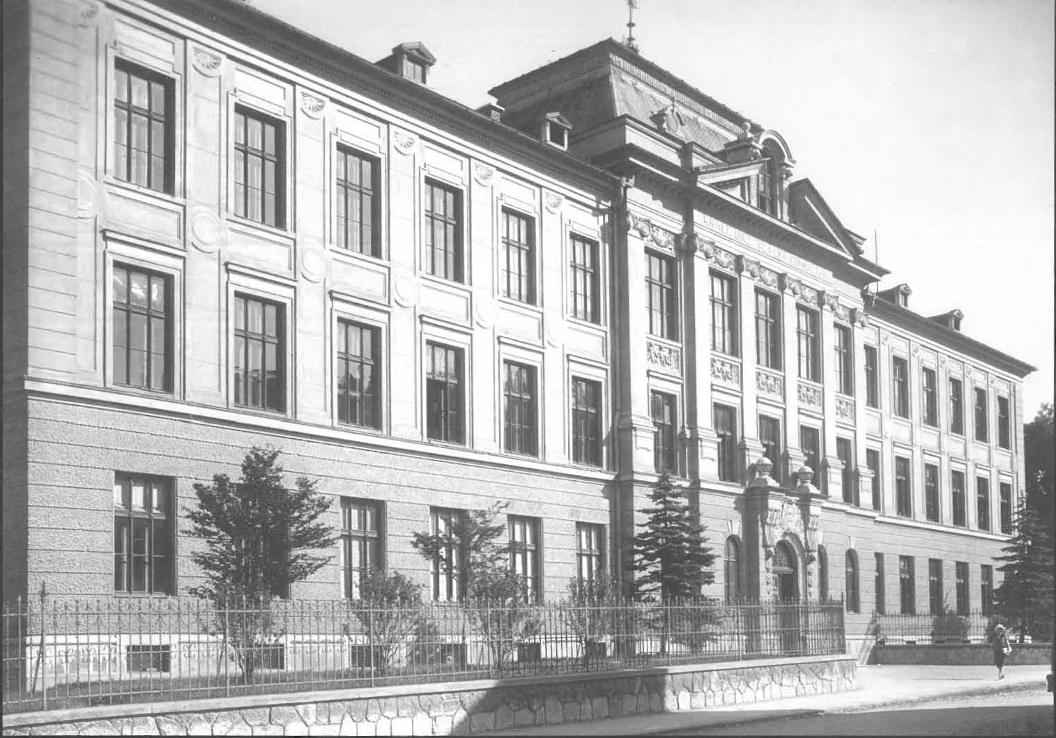 Poslopje II. državne gimnazije na Poljanah